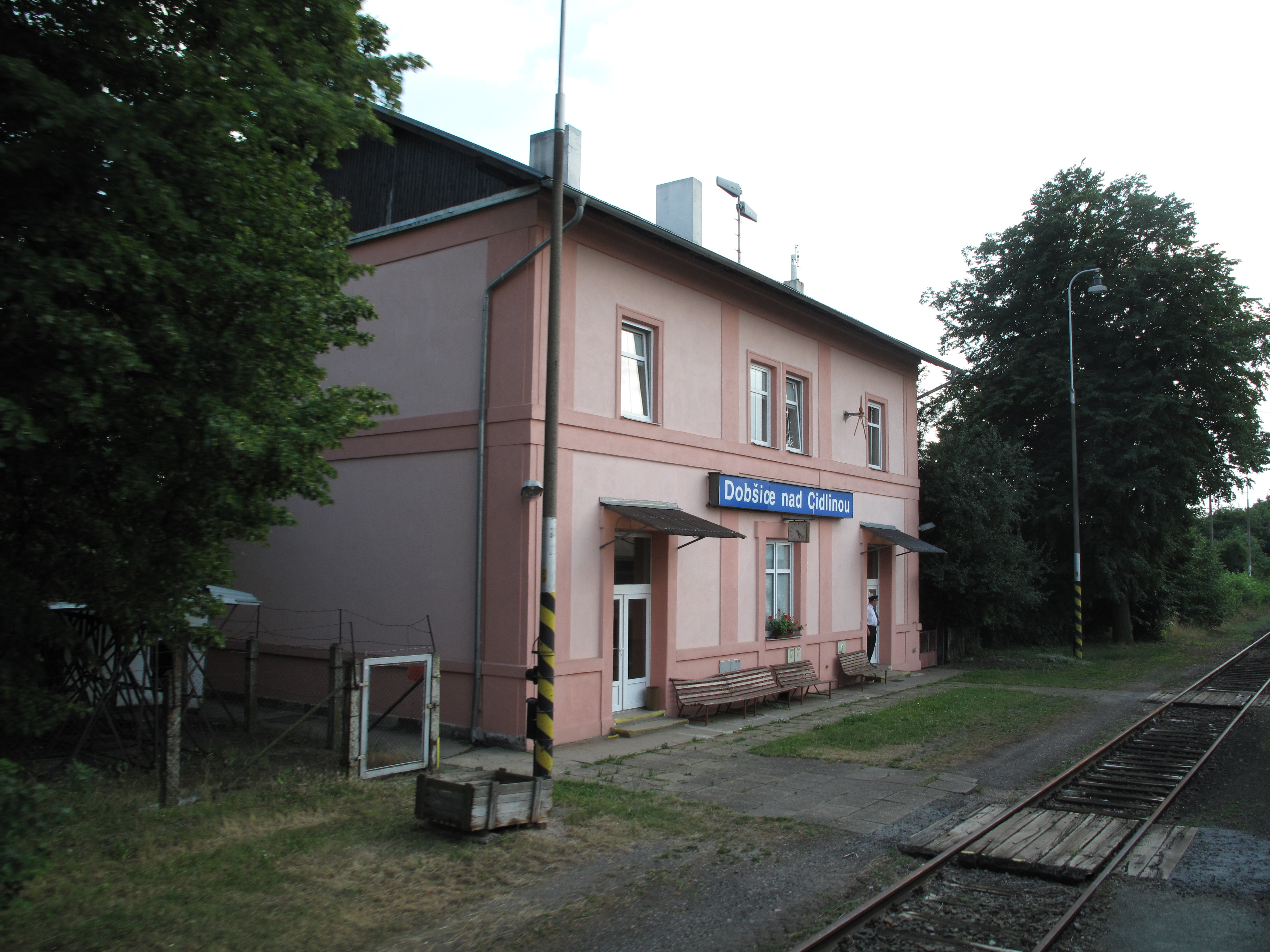 Dobšice nad Cidlinou, železniční stanice